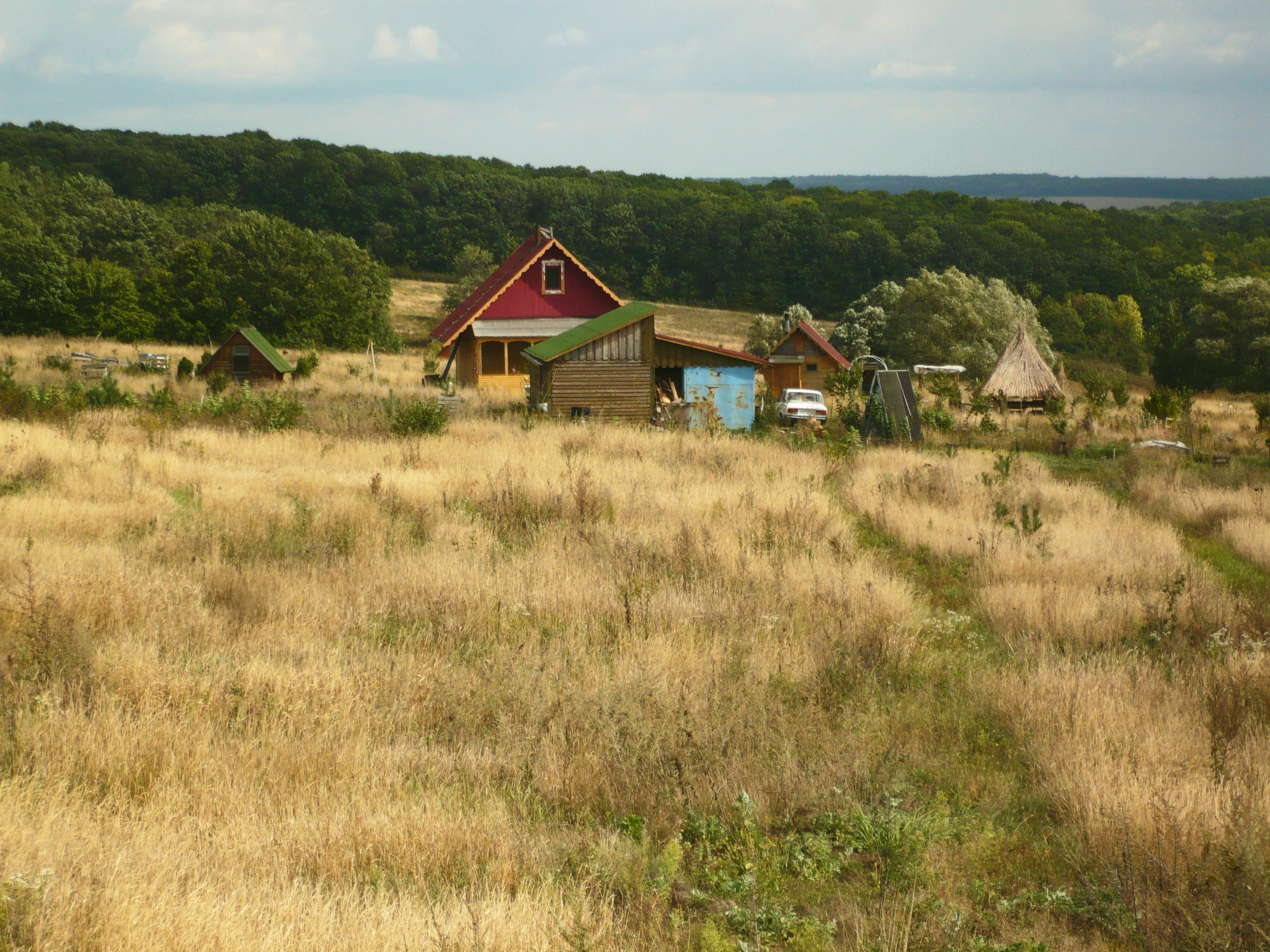 Строения на участке.